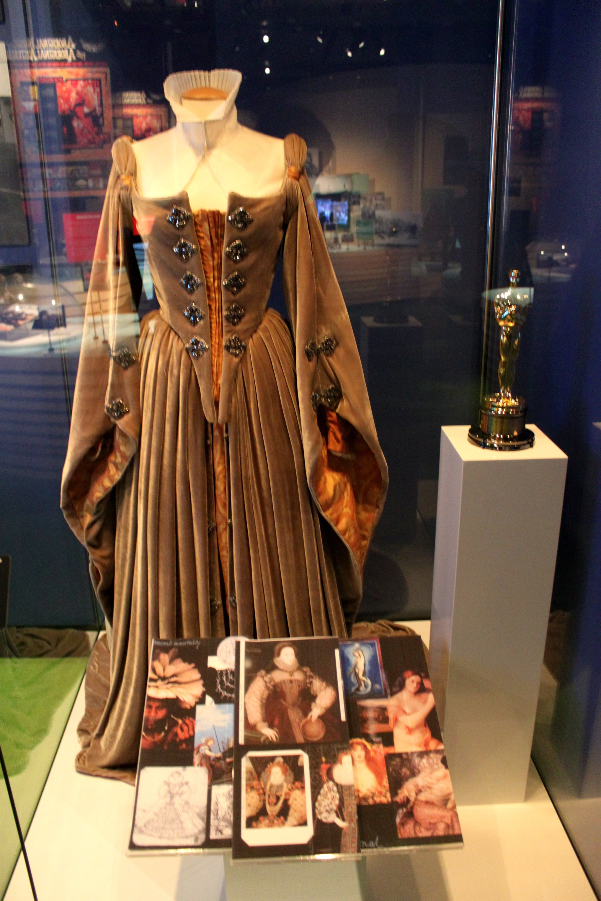 ACMI_13; costume designː Alexandra Byrne